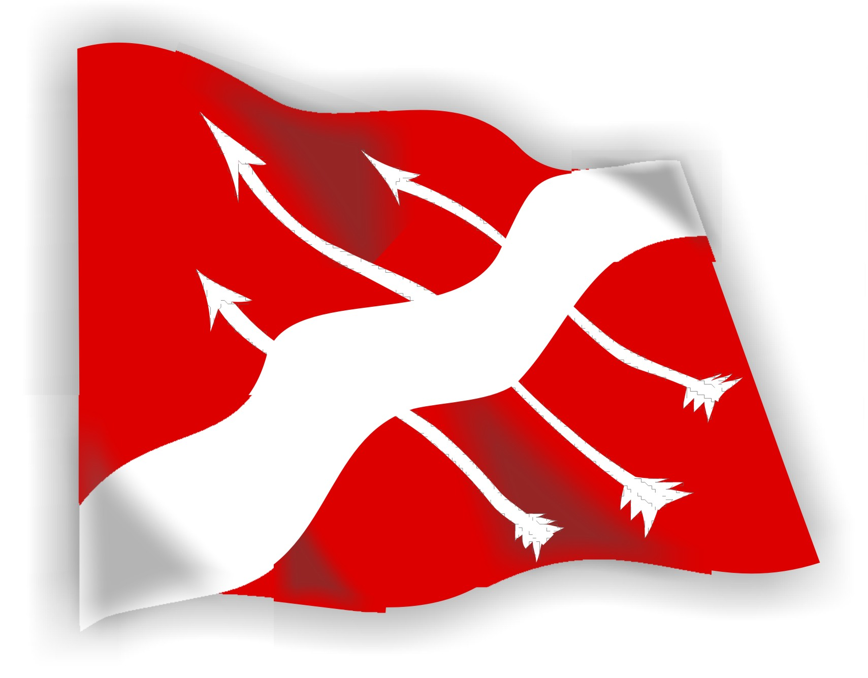 Bandeira de São Sebastião do Passé